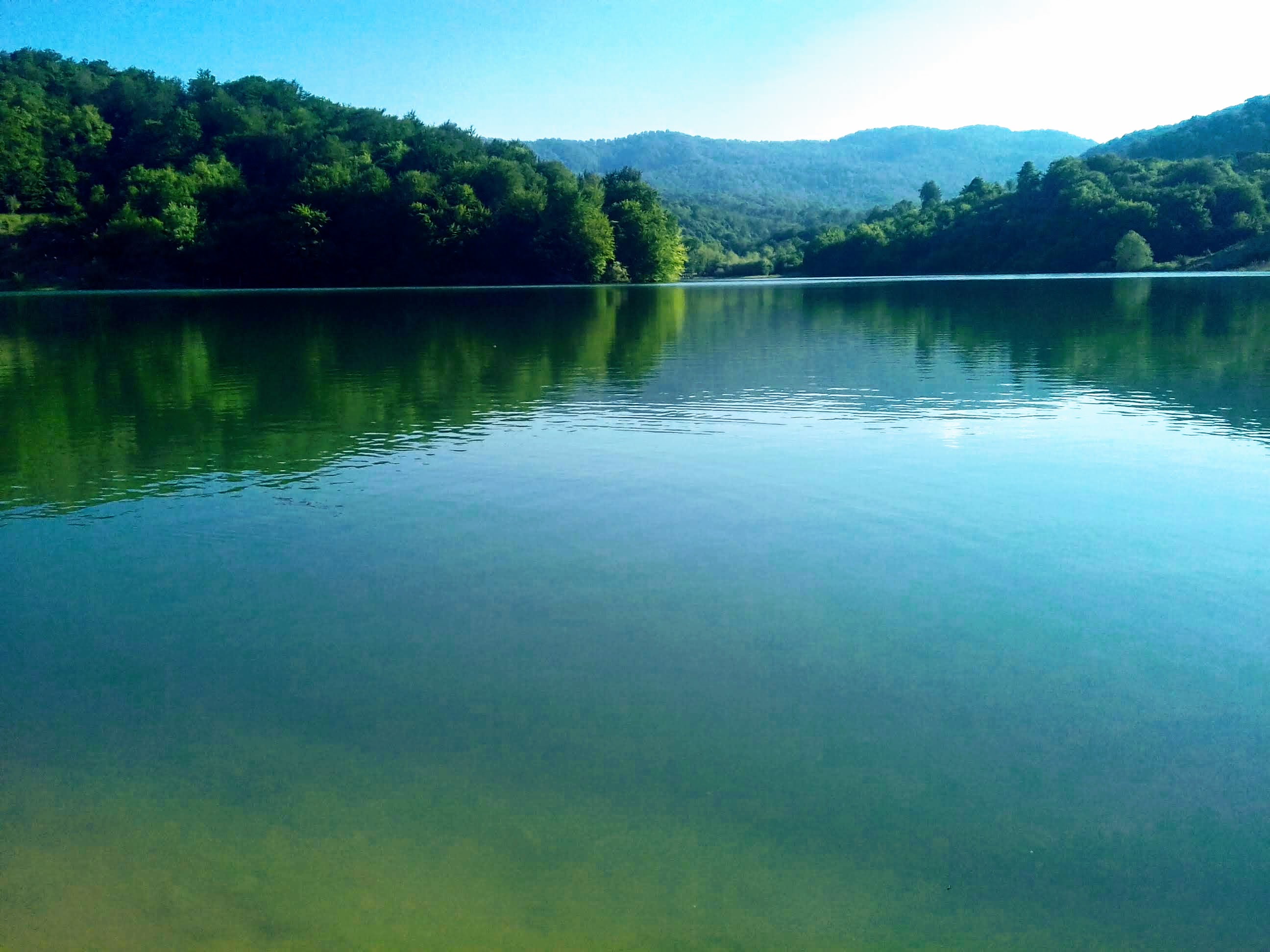 Quba rayonu.Çənlibel gölü.